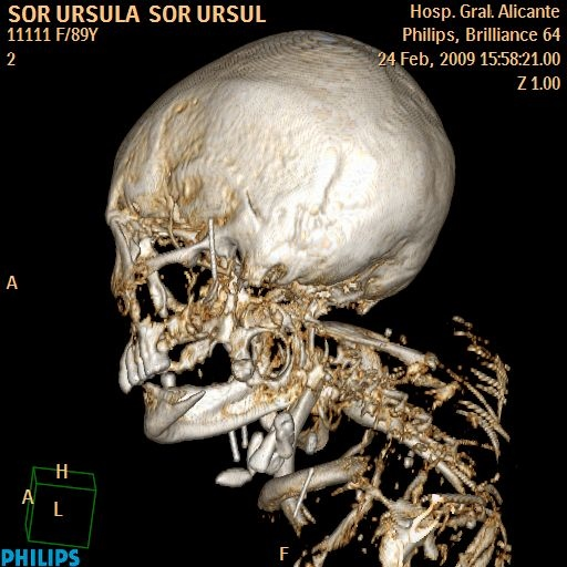 Detalle del cráneo TAC